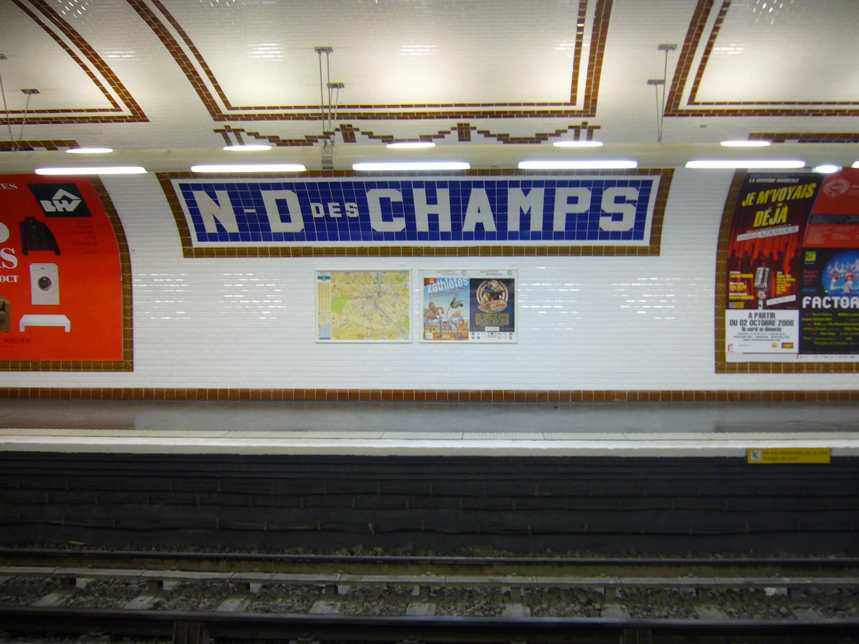 Station Notre-Dame-des-Champs sur la ligne 12 du métro de Paris.